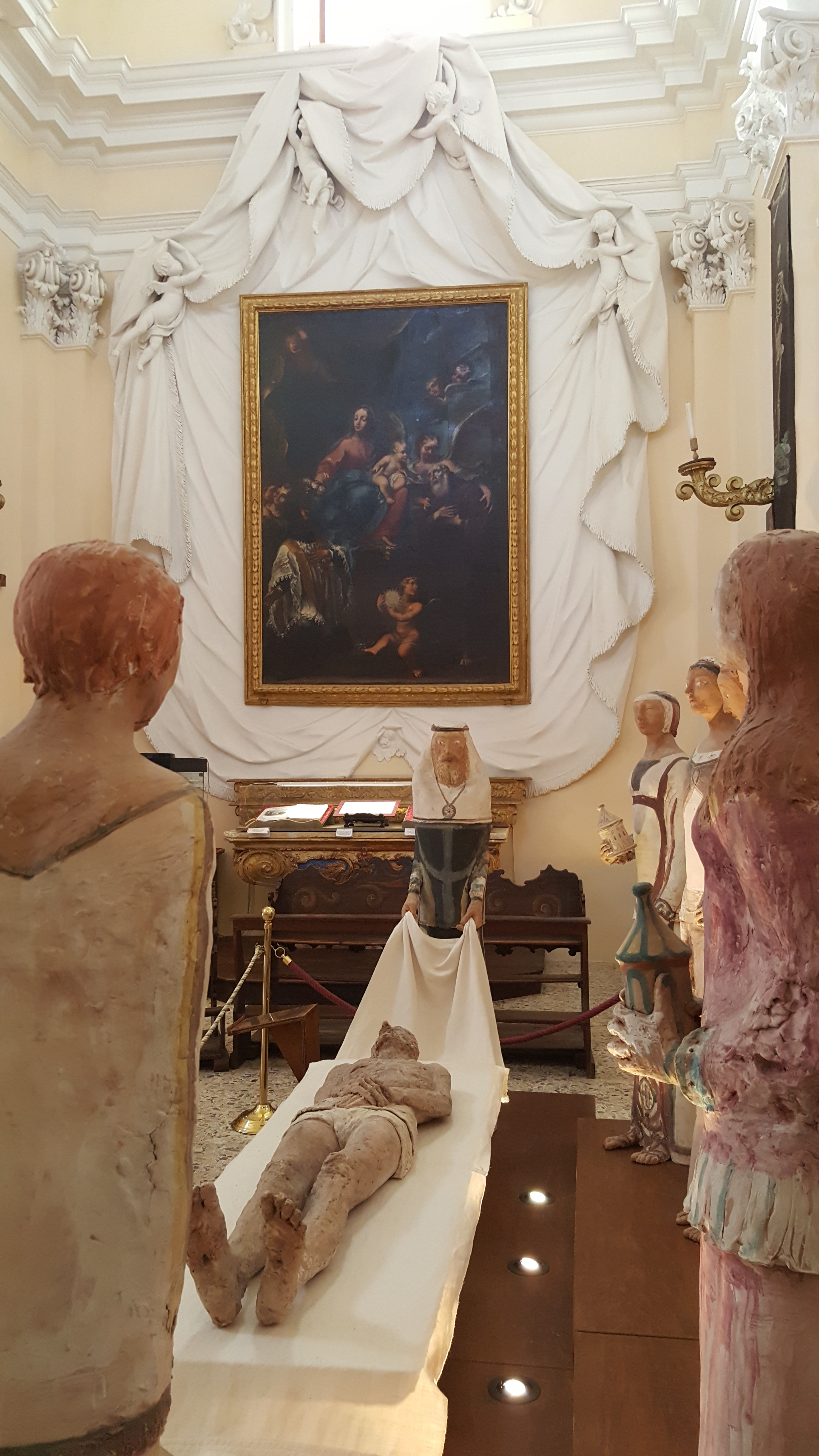 Museo d'Arte Sacra This is a photo of a monument which is part of cultural heritage of Italy.